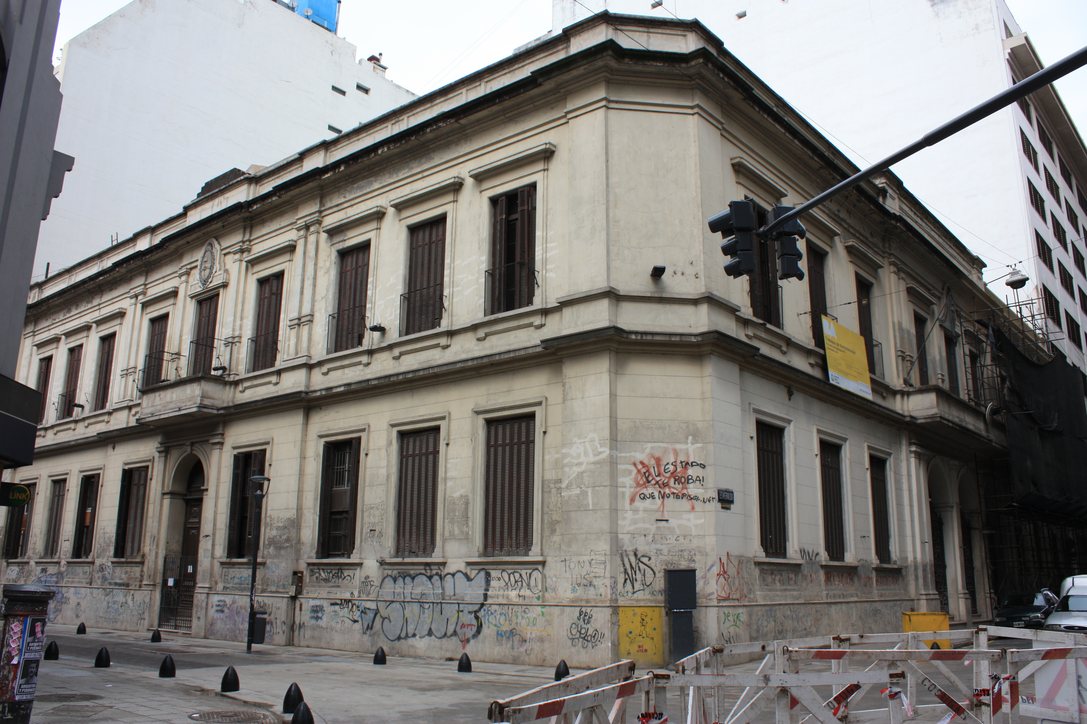 Escuela de Danzas María Ruanova